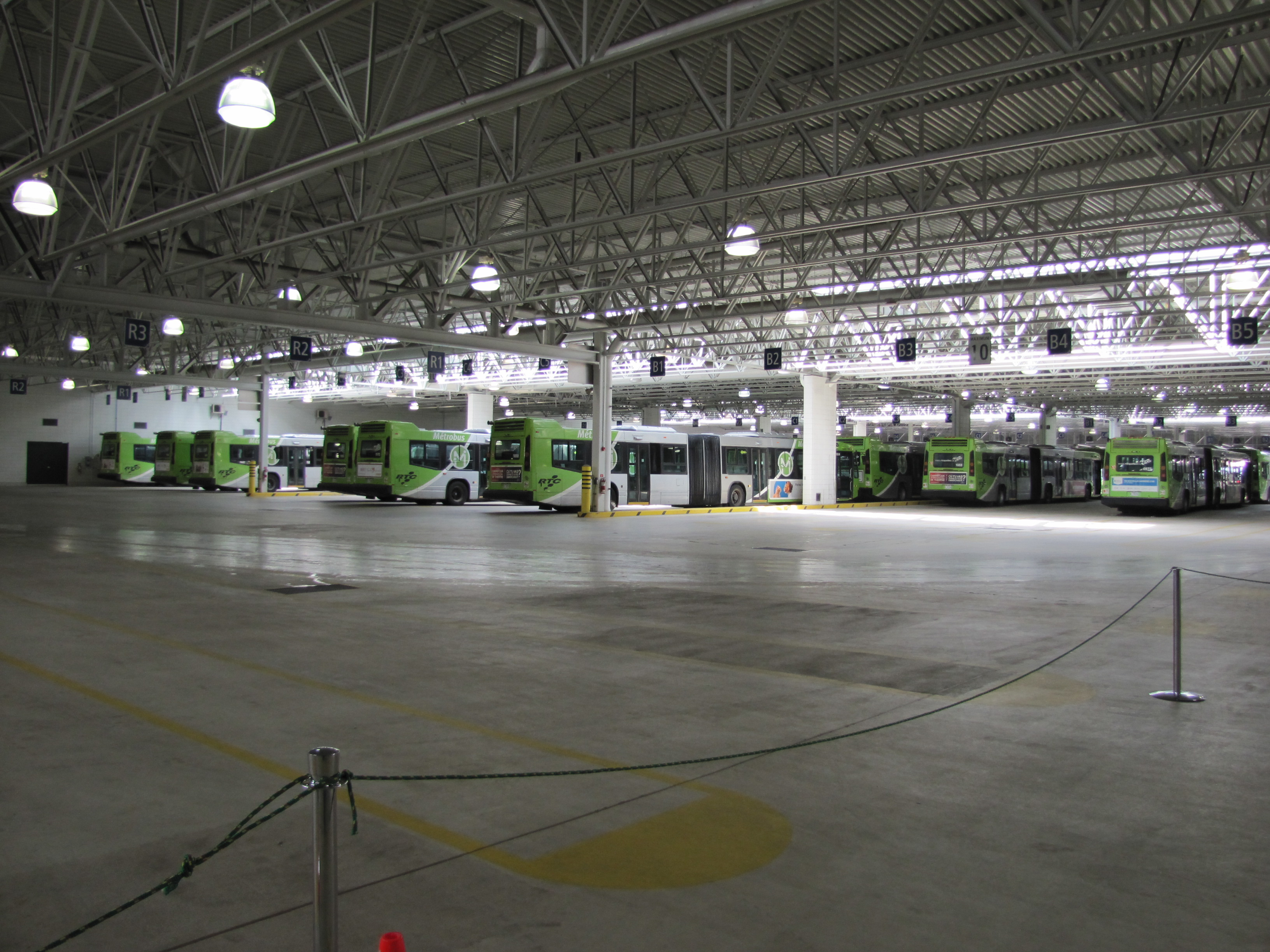 Une partie des baies de stationnement des autobus au Centre Métrobus du Réseau de la Capitale (RTC) à Québec. Le garage accueille 137 véhicules articulés de 19 m, et compte 9 baies d'entretien.